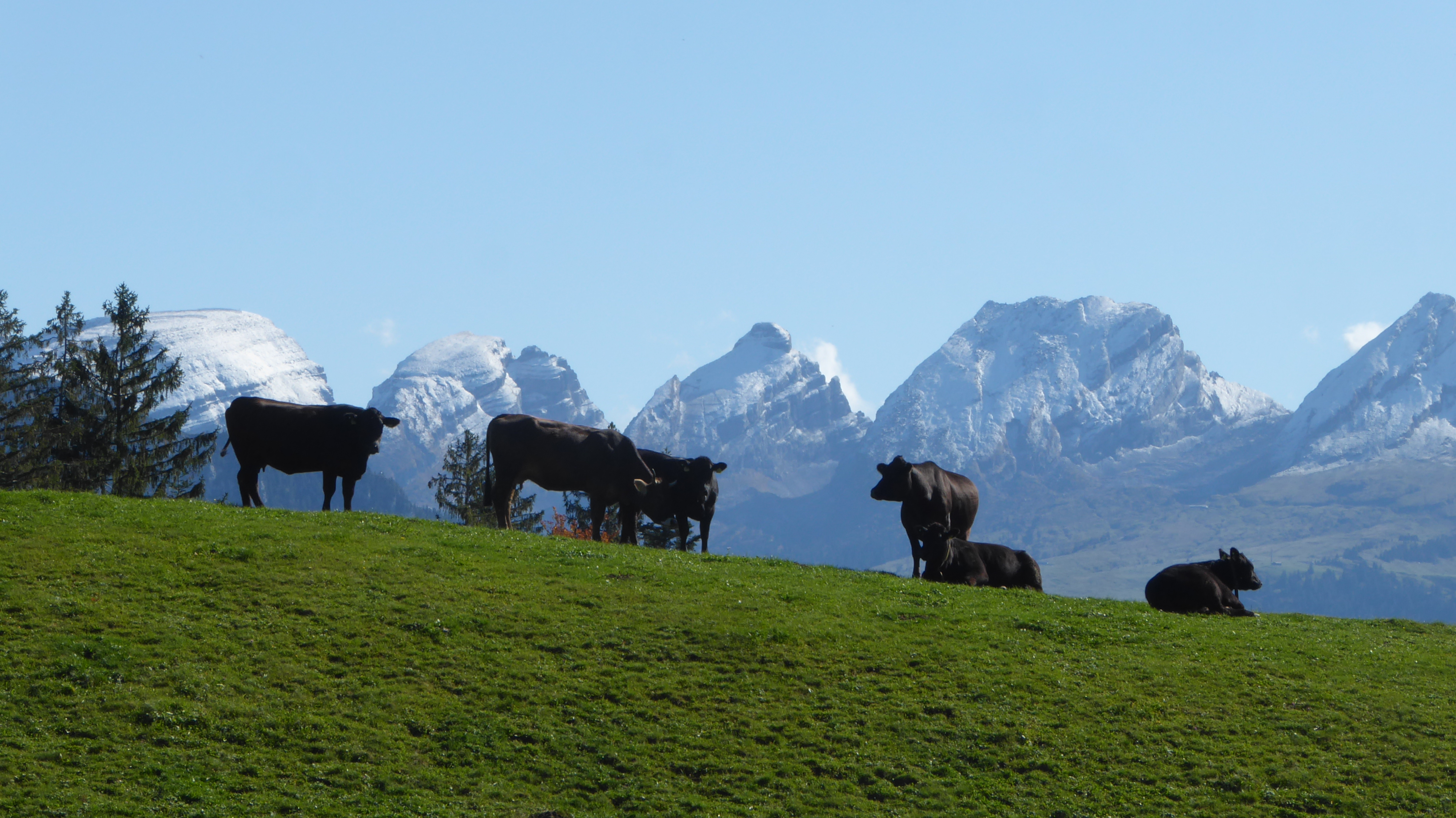 Blick von Kellen auf die Churfirsten